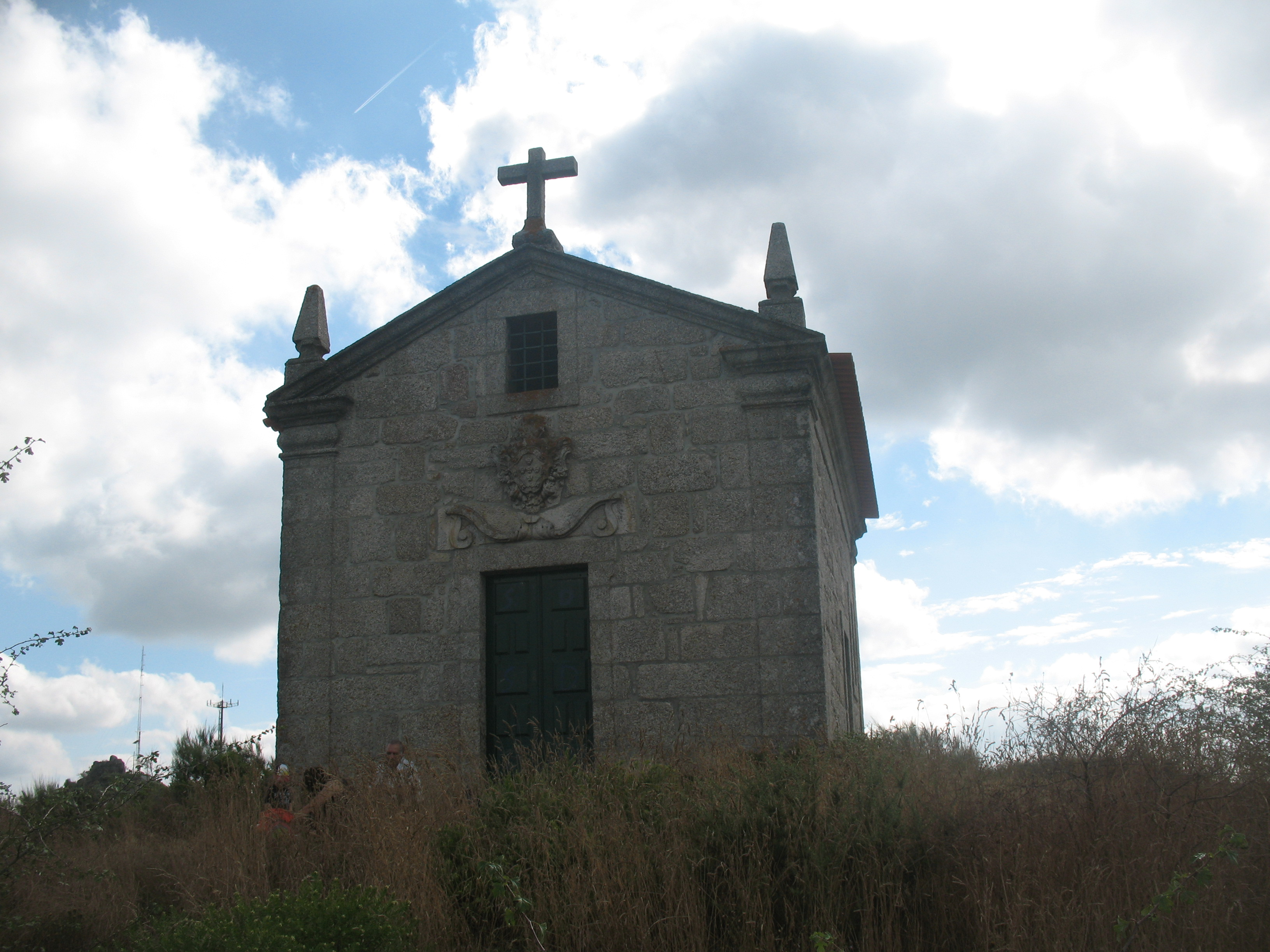 Igreja de Santa Cruz de Louredo